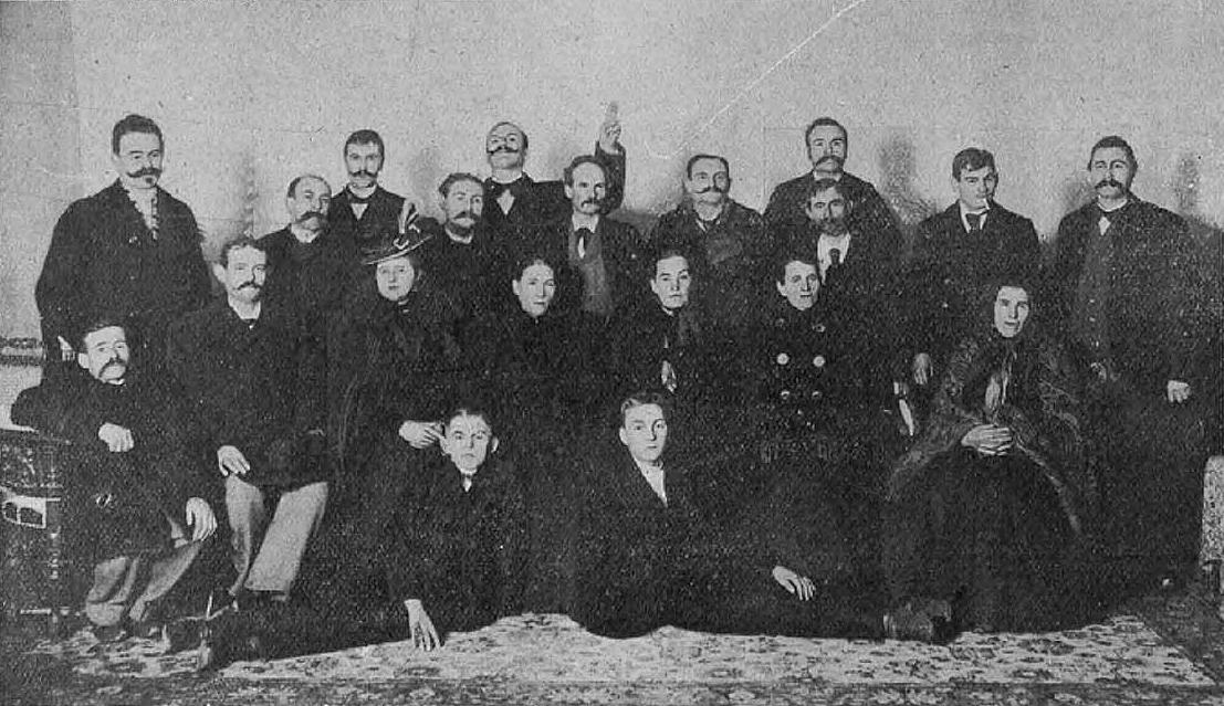 Oskarżeni w procesie wrzesińskim (21 listopada 1901)